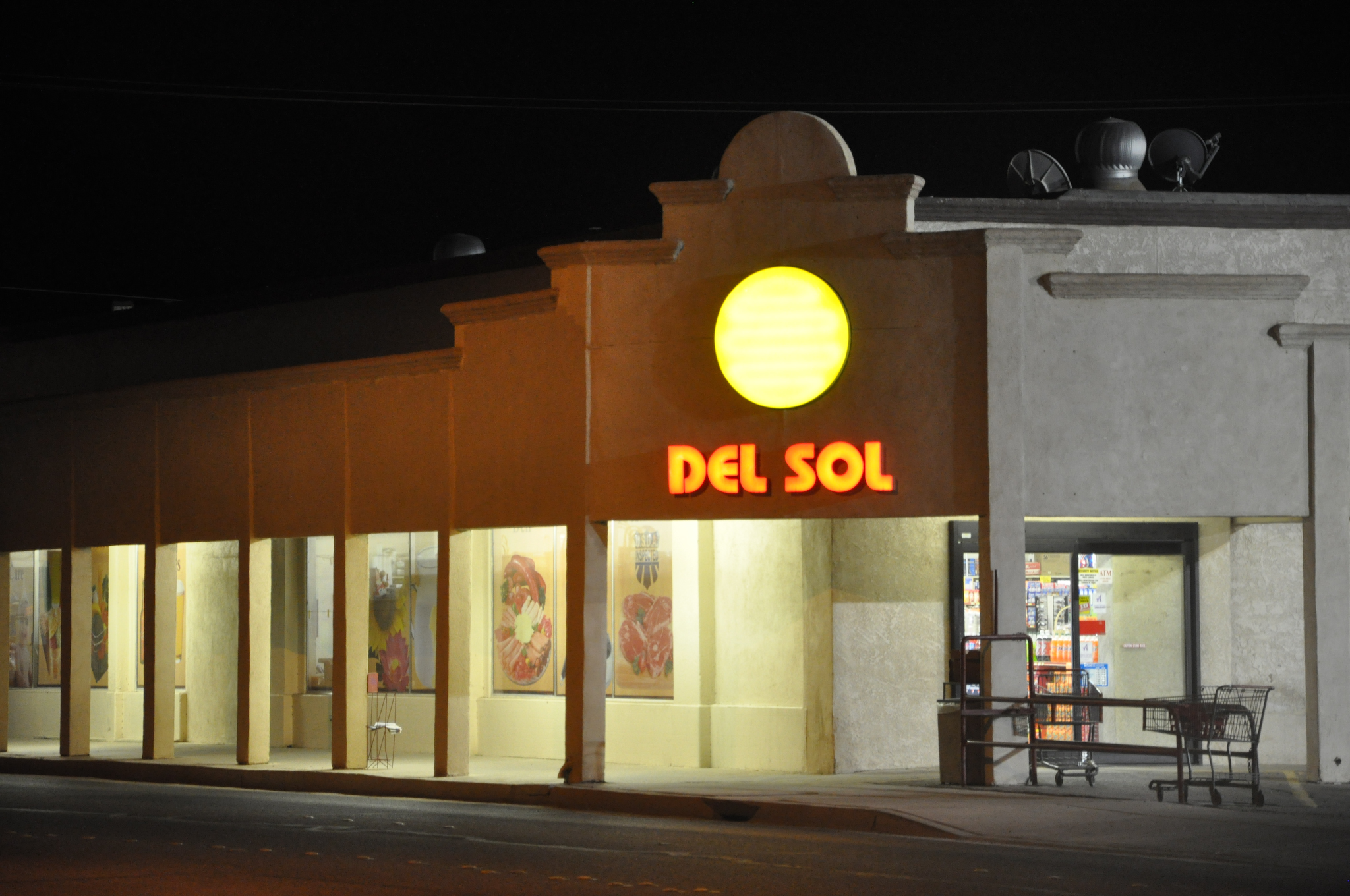 Supermarket, Somerton AZ. MappingMainStreet_SomertonAZ-18